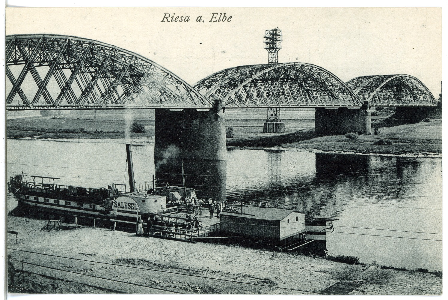 Riesa; Dampferstation mit Dampfer Salesel